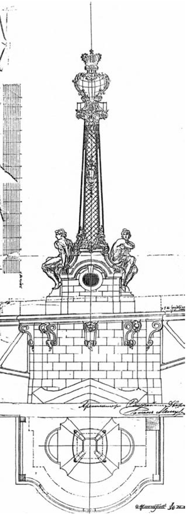 Проект фонарного столба для быков №3, 4 Дворцового моста через Неву в Петербурге. Архитектор Р.Ф.Мельцер, 1910 г.